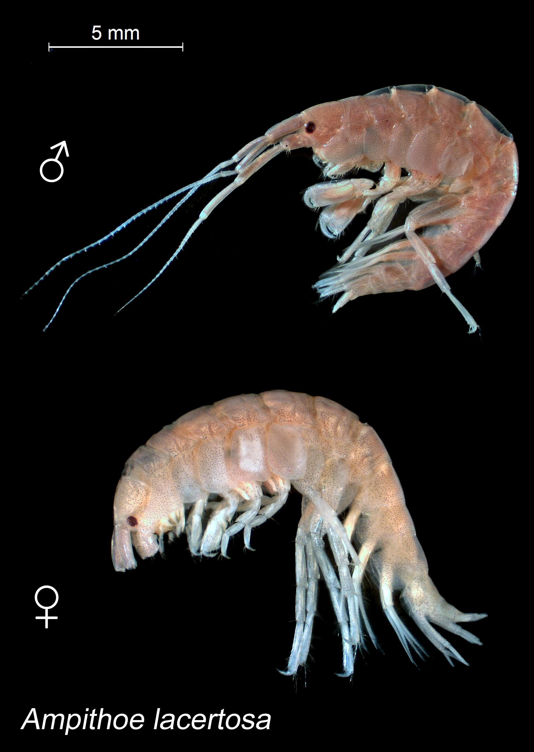 Ampithoe lacertosa (Charles Spence Bate 1858)